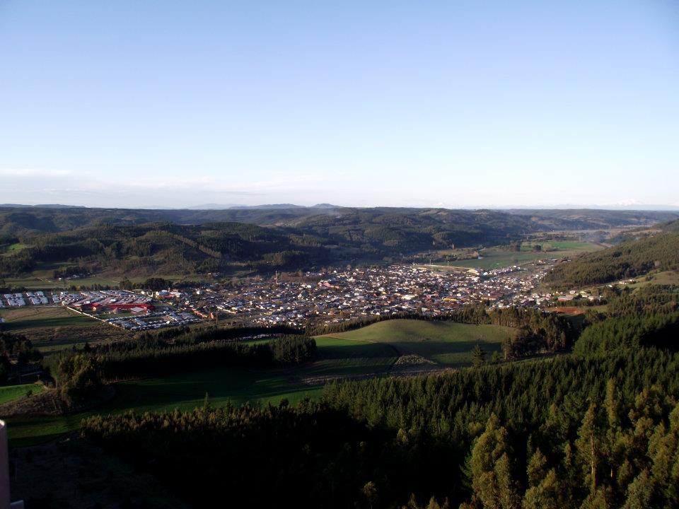 Fotografía Panorámica de Galvarino, Año 2011